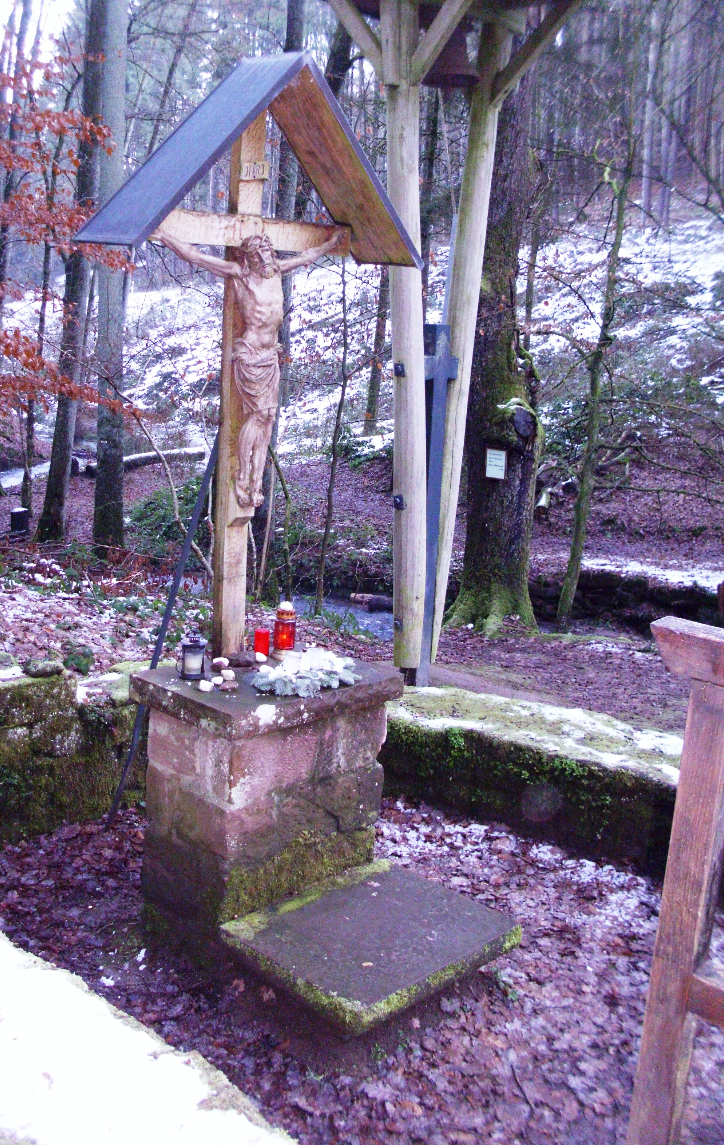 Detailsicht auf die Christusfigur an der ehemaligen Altarstelle